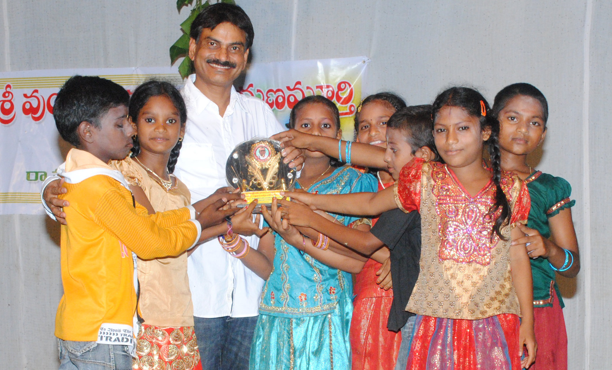 పరివర్తన ఫౌండేషన్ కార్యక్రమంలో విద్యార్ధులతో తెంటు సత్యనారాయణ